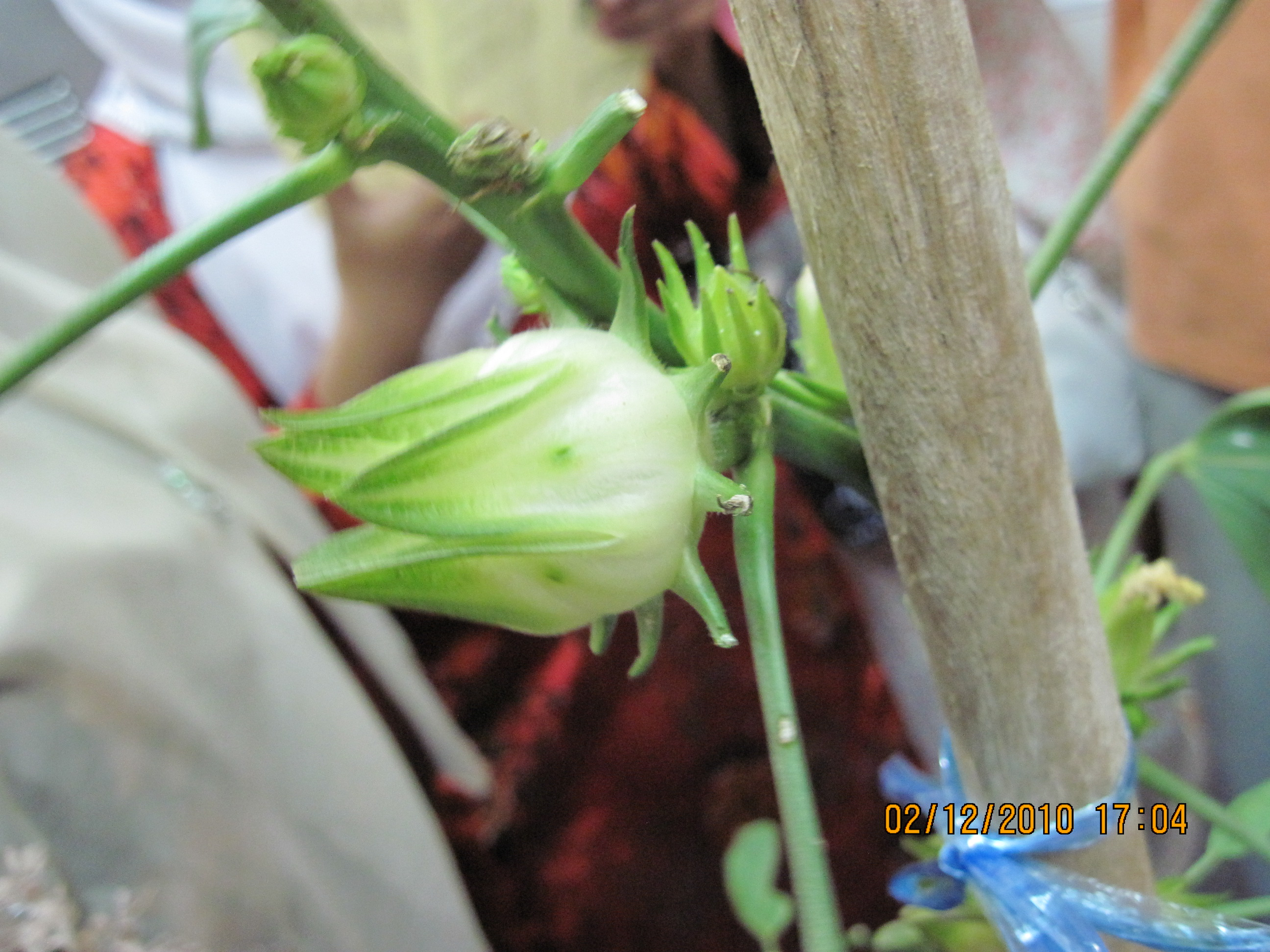 Roselle varieti putih